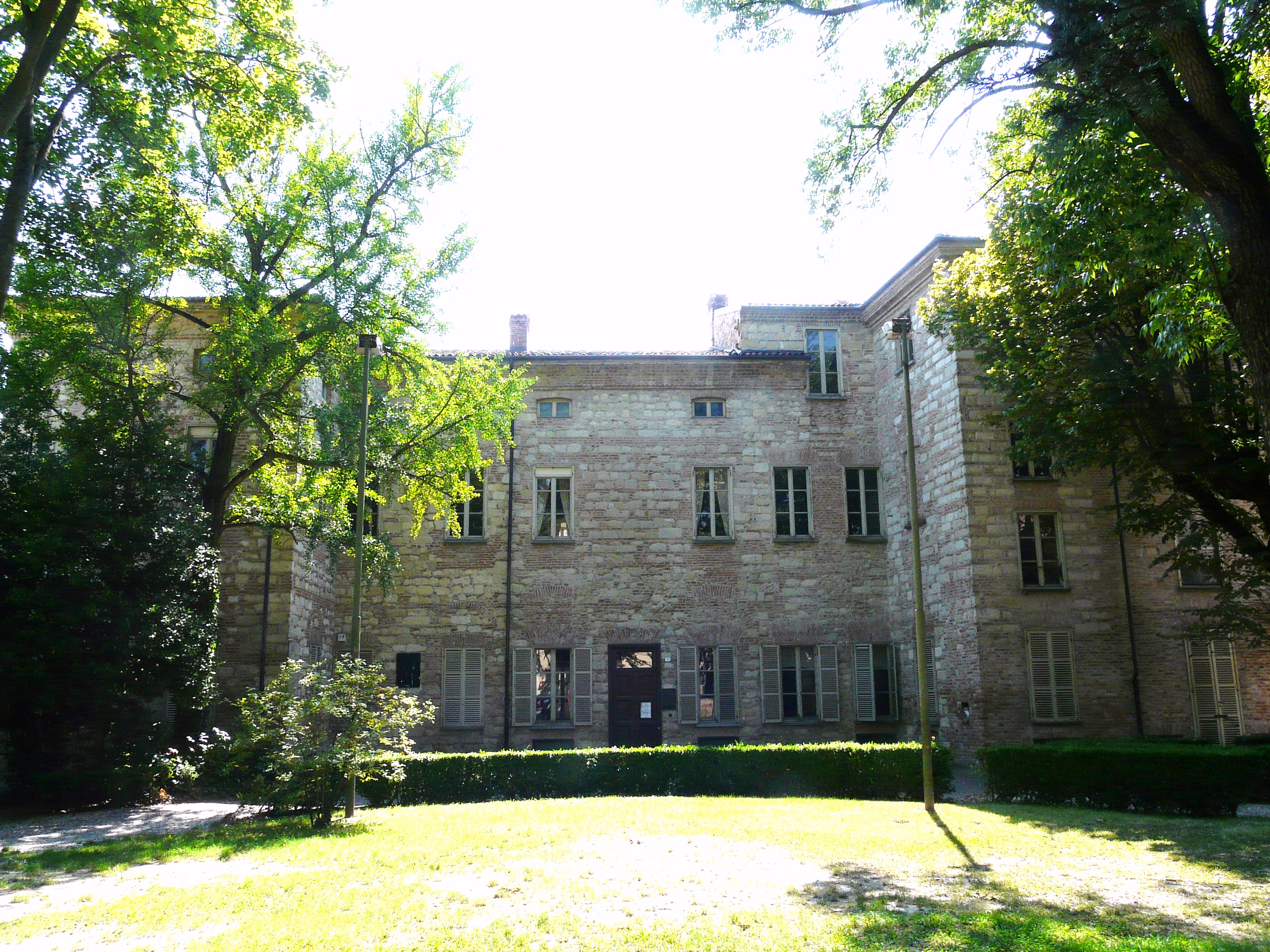 Palazzo Callori, Vignale Monferrato, Piemonte, Italia